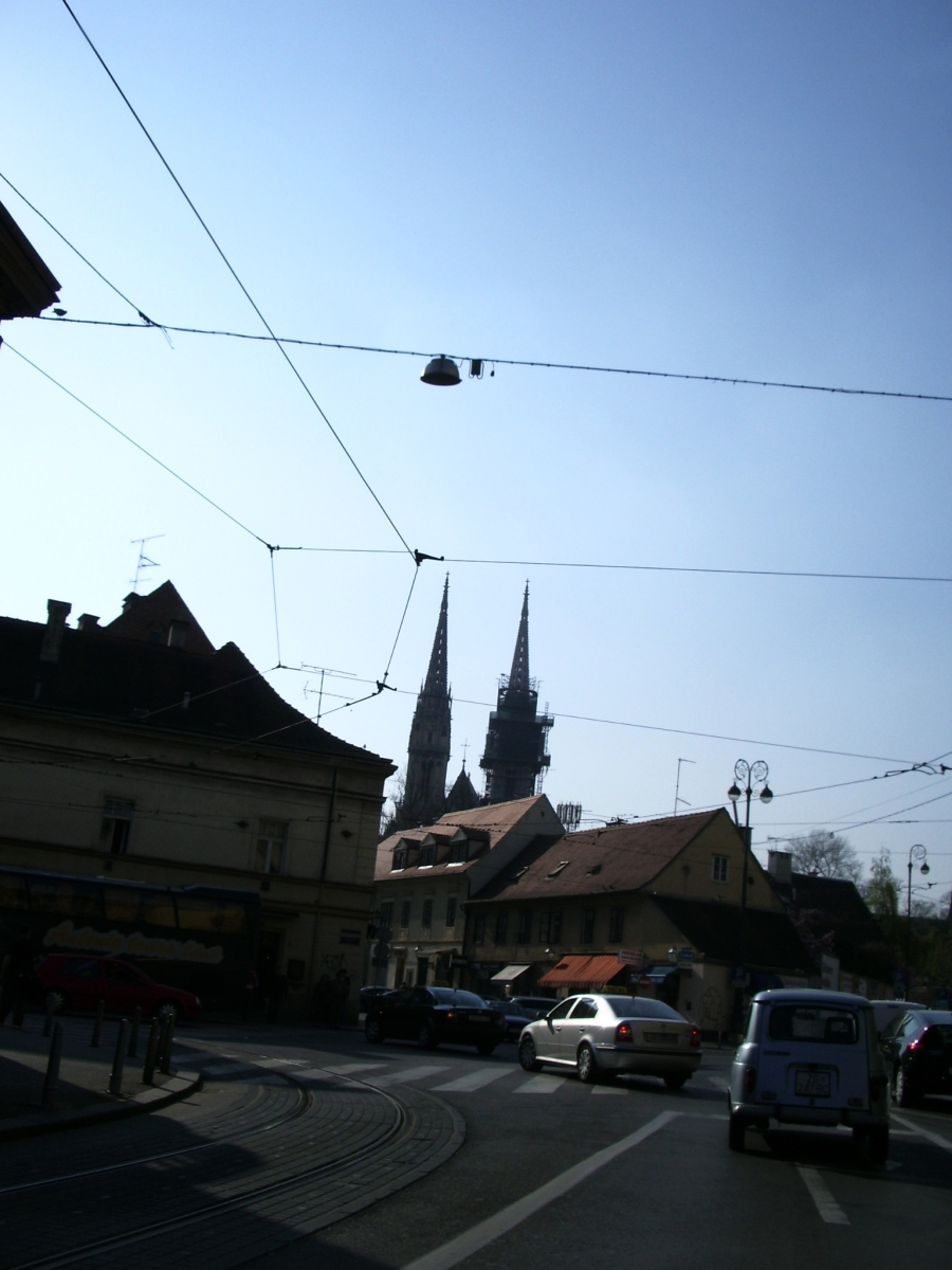 Križanje Vlaške i Draškovićeve ulice u Zagrebu